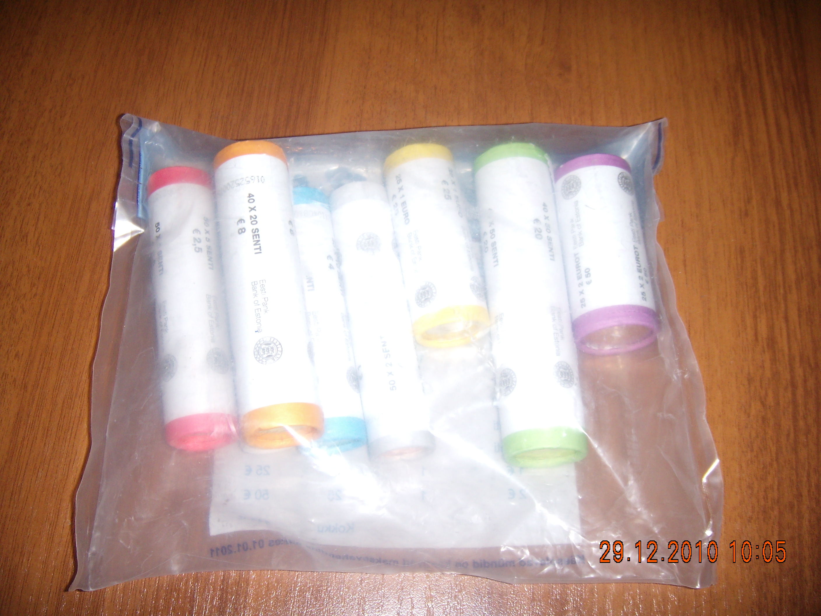 Комплект евро монет (111 евро)